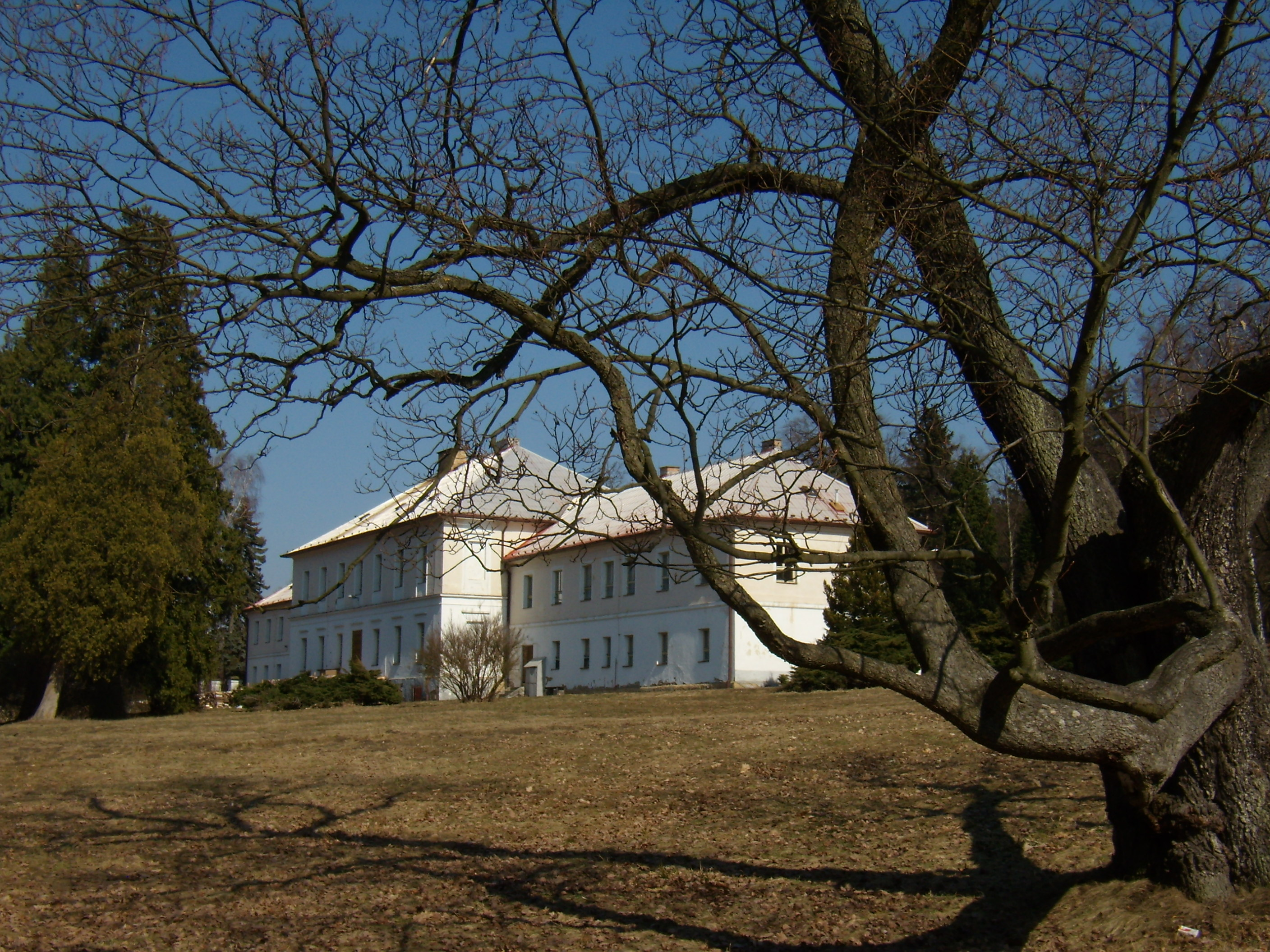 Březina - zámek